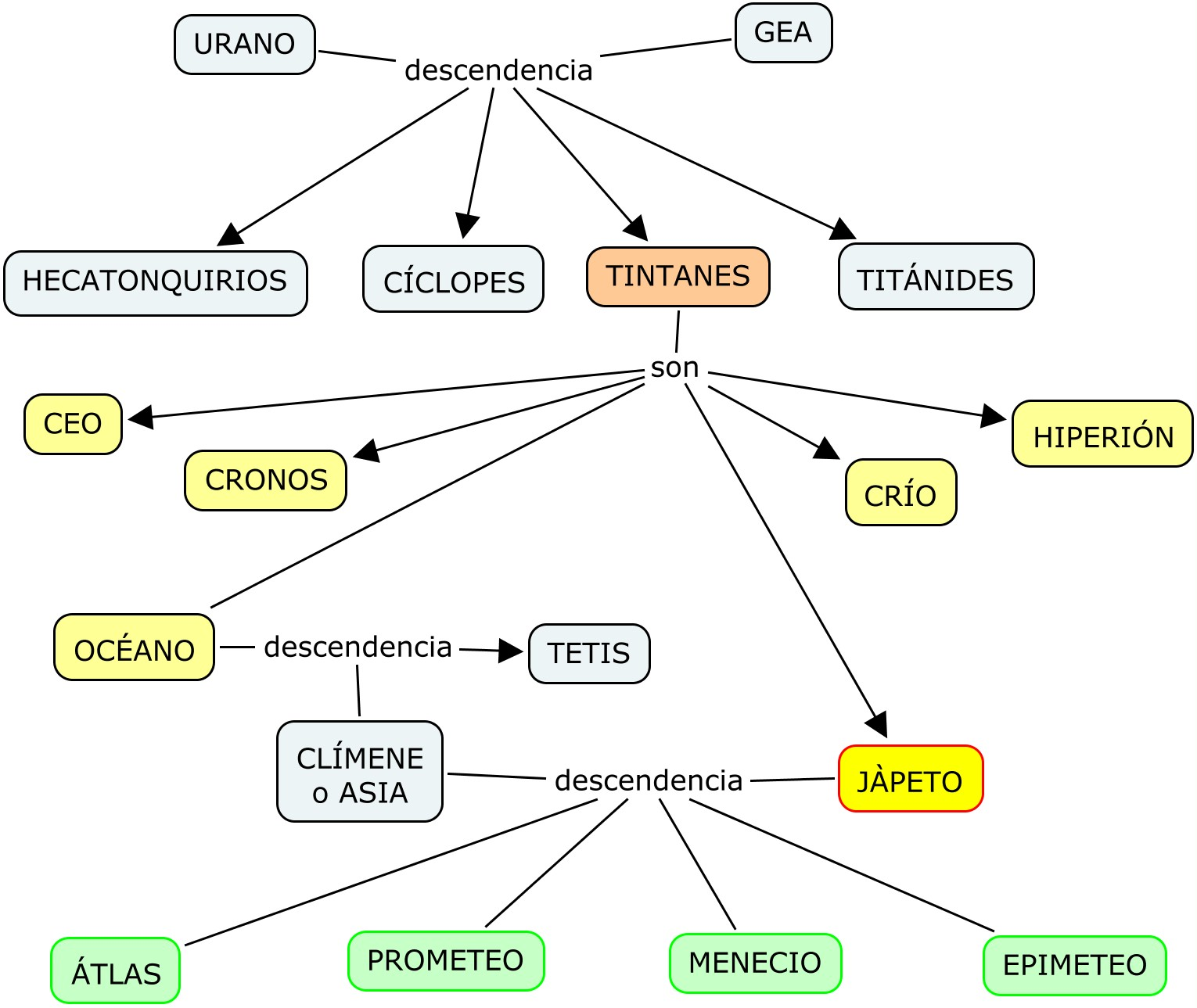 genealogía Jápeto